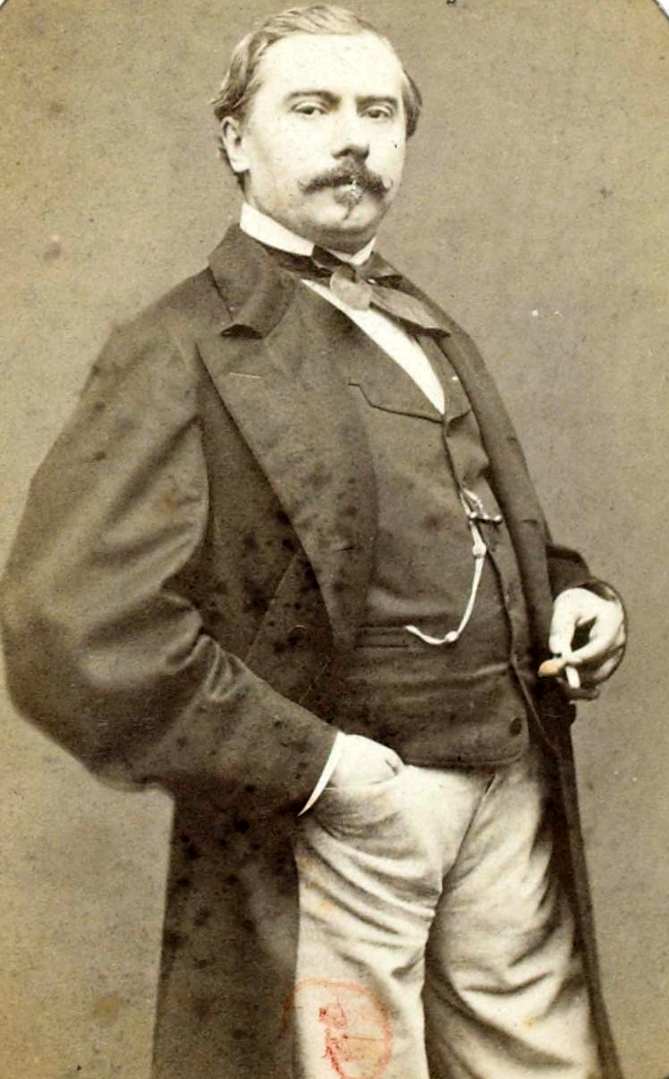 [Recueil. Personnalités des arts et des lettres] : vue 26 - F. 10v. Charles Müller (Carjat phot.)